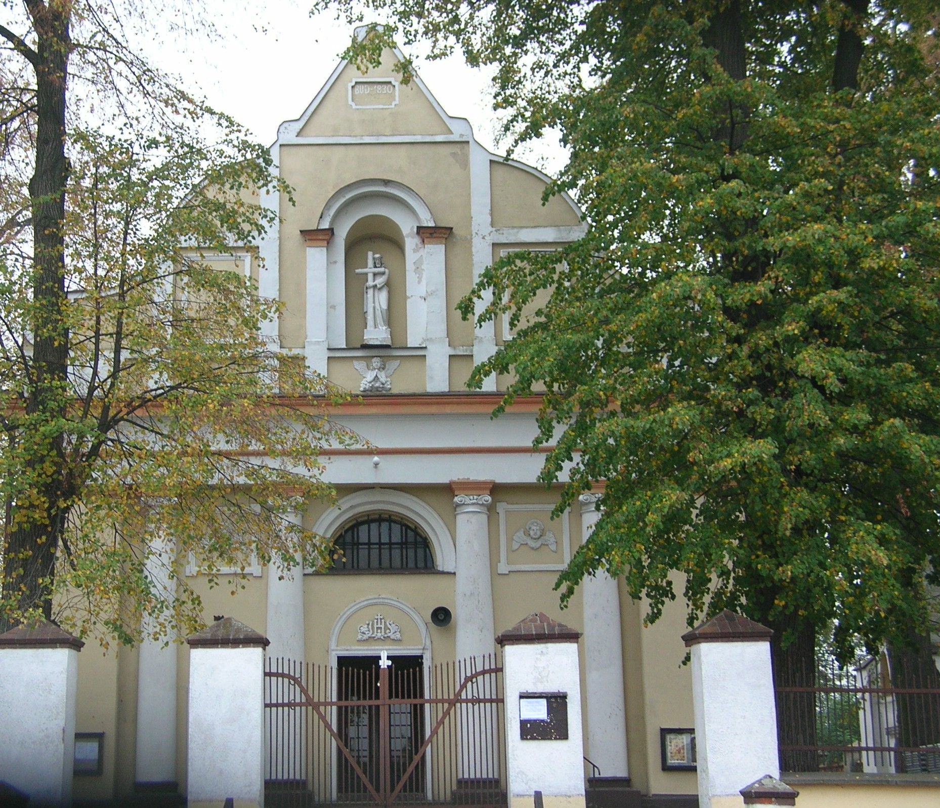 kościół w Rudnikach, church in Rudniki